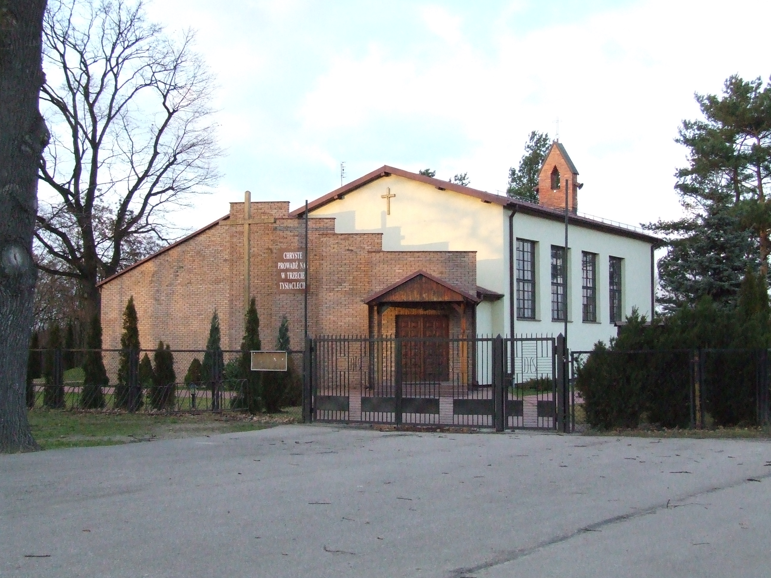 Cząstków Mazowiecki, gm. Czosnów, PARAFIA MATKI BOŻEJ KRÓLOWEJ POLSKI W CZĄSTKOWIE MAZOWIECKIM